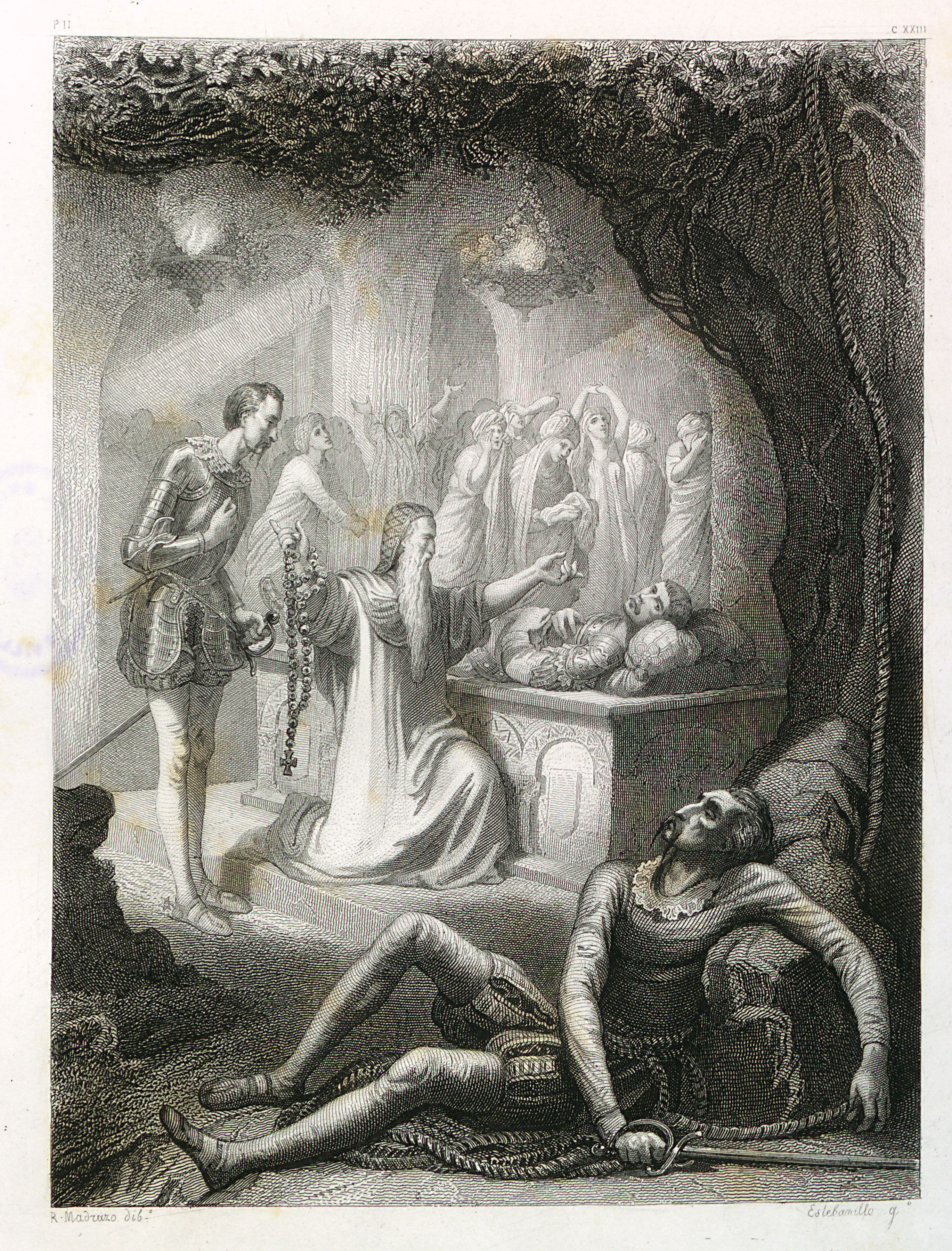 Autor: Cervantes Saavedra, Miguel de (1547-1616) Descripción bibliográfica: El ingenioso hidalgo Don Quijote de la Mancha / compuesto por Miguel de Cervantes Saavedra. - Barcelona : Imp. de Tomás Gorchs, editor, 1859. -2 v. (XIX, 430 ; IX, 469 p., [6] h. de lám.) : il. ; 44 cm. Localización